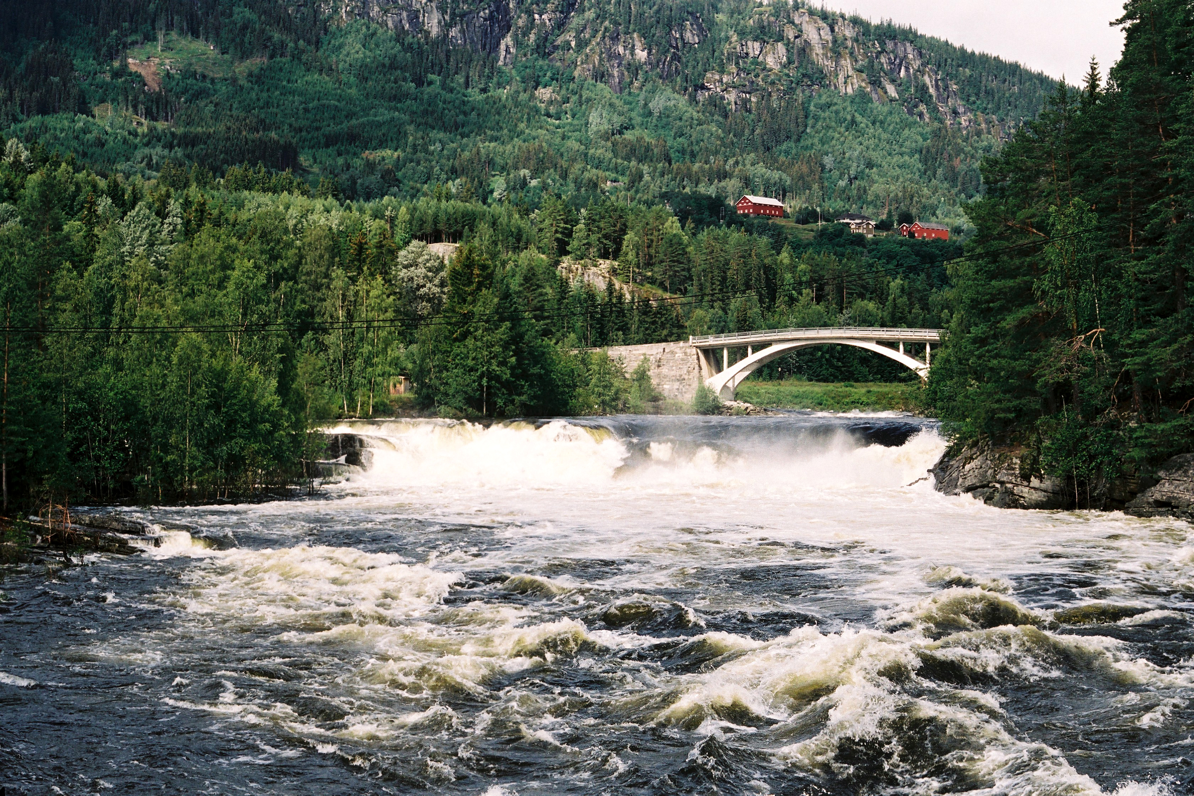 Numedalslågen, Norway. Mykstufoss at Veggli, Rollag.